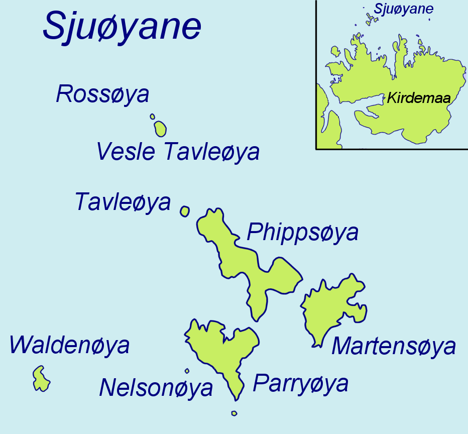 Sjuøyane kaart